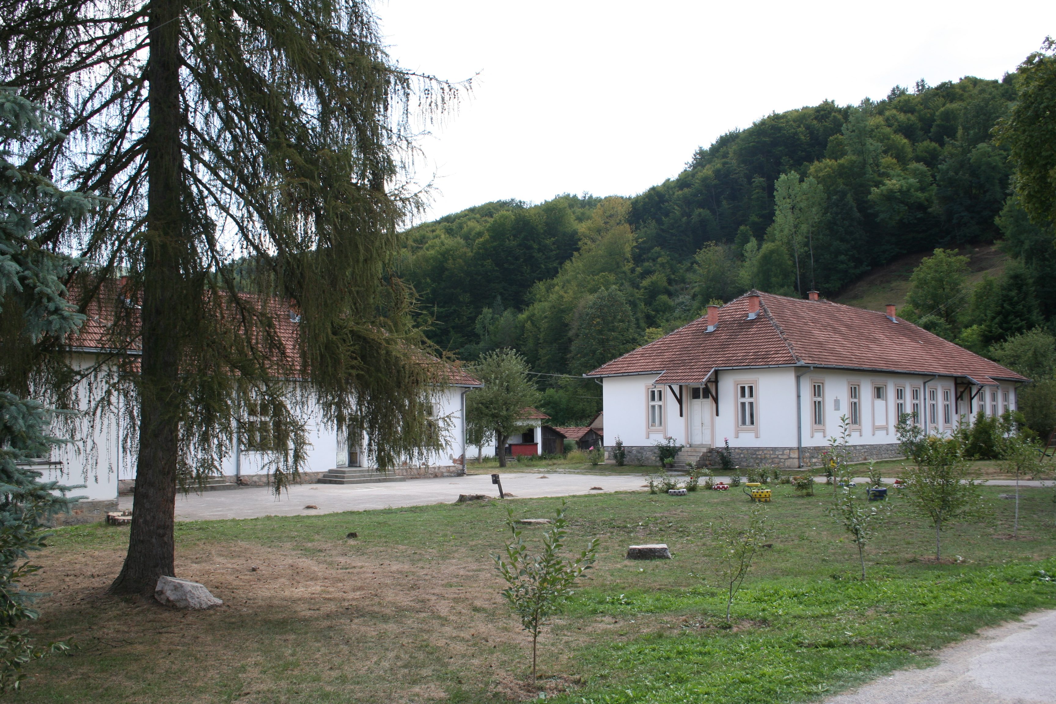 Seča Reka